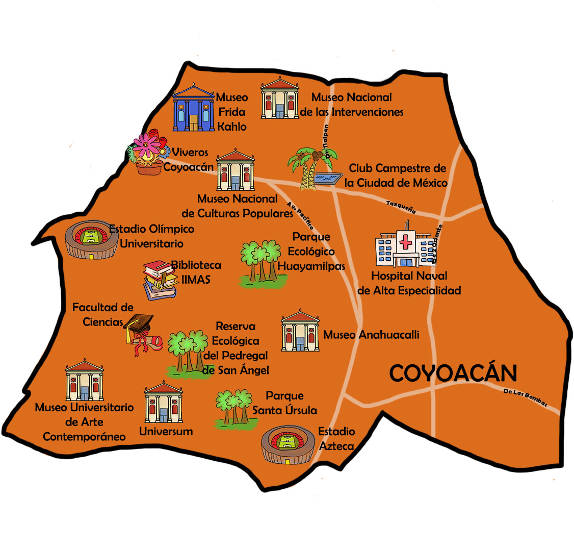 Mapa de la delegación de Coyoacán, mostrando los lugares y calles importantes.